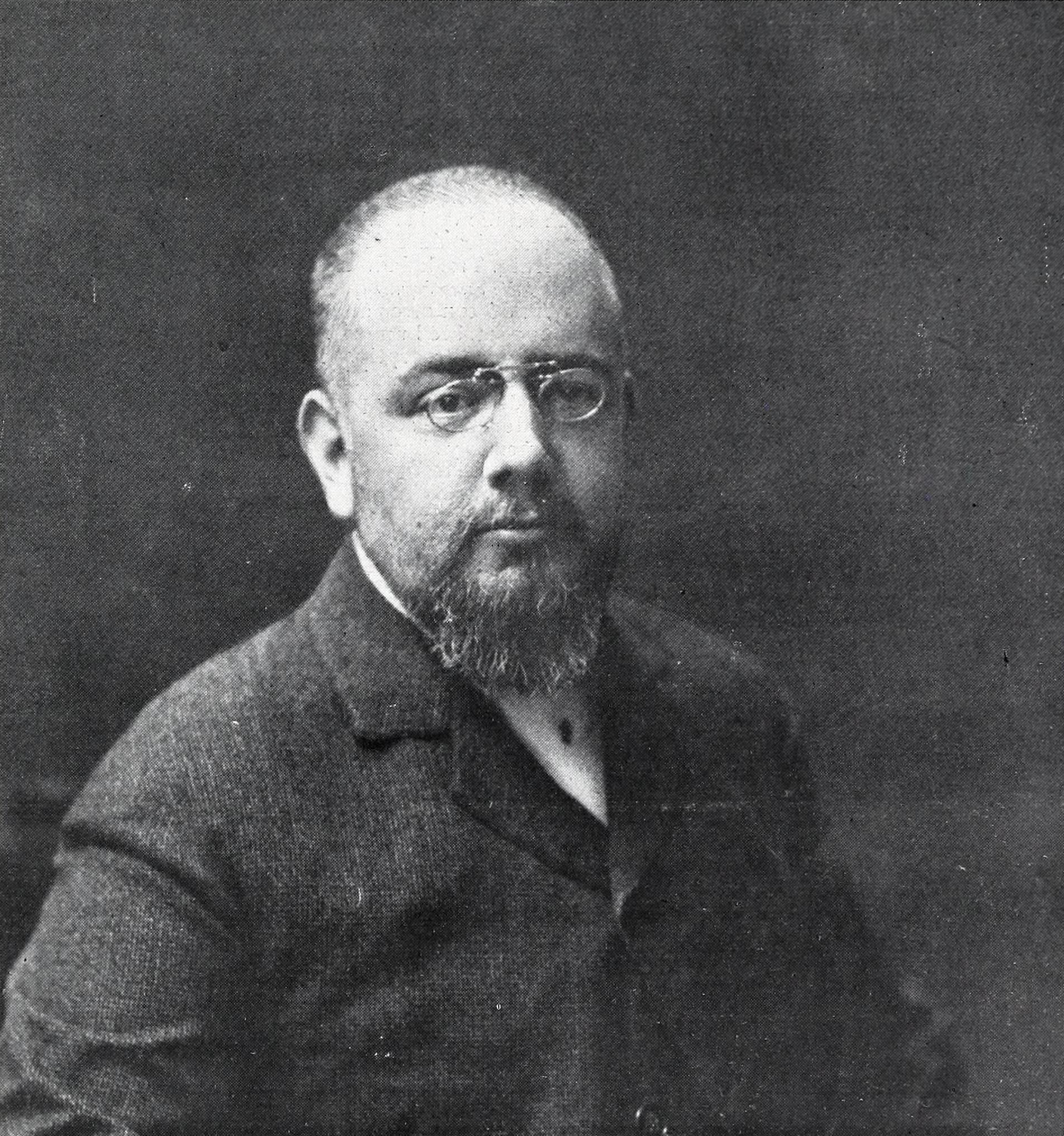 Francisco Navarro Ledesma.